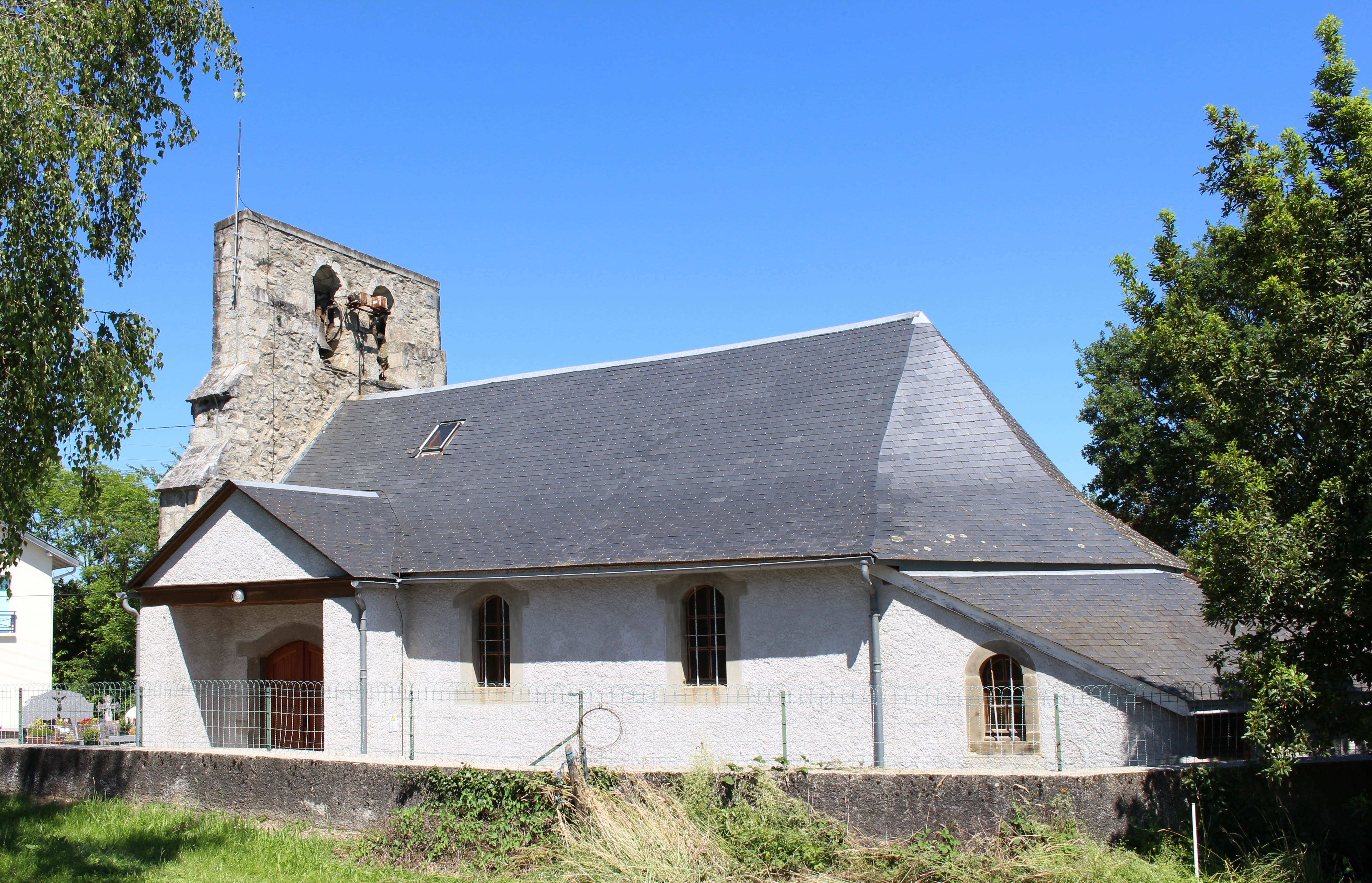 Église Saint-Martin d'Espieilh (Hautes-Pyrénées)